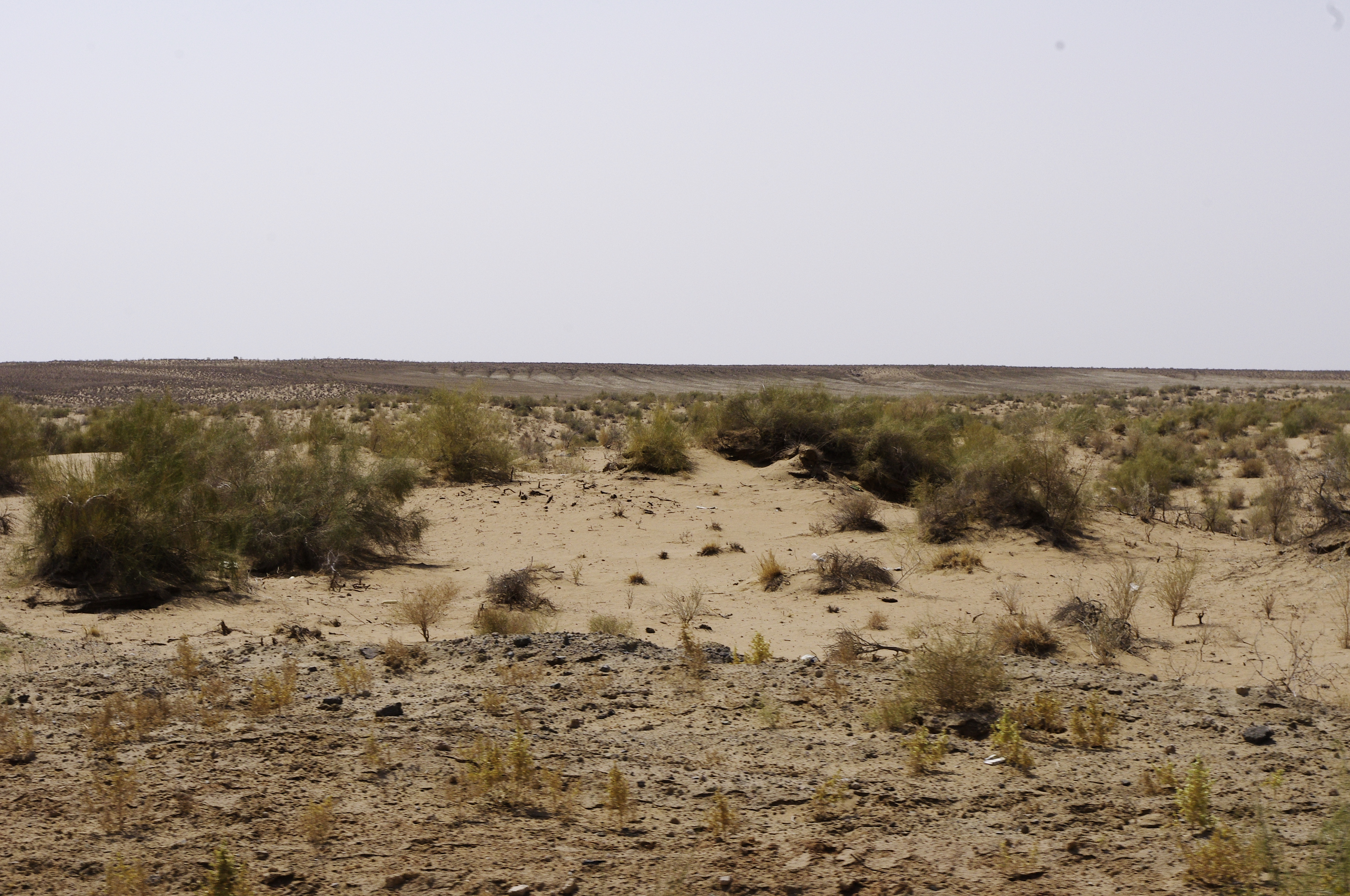 The making of this document was supported by Wikimedia Polska. To zdjęcie zostało wykonane podczas Wikiwyprawy 2015.Wszystkie zdjęcia z wyprawy możesz zobaczyć w kategorii: Wikiwyprawa 2015. English | polski | +/− To zdjęcie zostało załadowane dzięki współpracy z firmą Hyperbook. polski | +/− To zdjęcie zostało załadowane dzięki współpracy z firmą: Kopex Group. English | polski | +/−